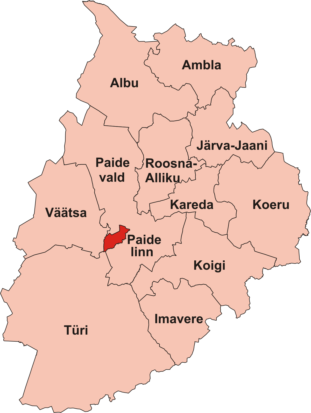 Järvamaa vallade kaart.